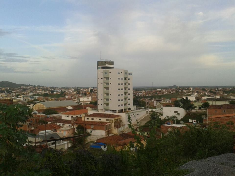 Guarabira